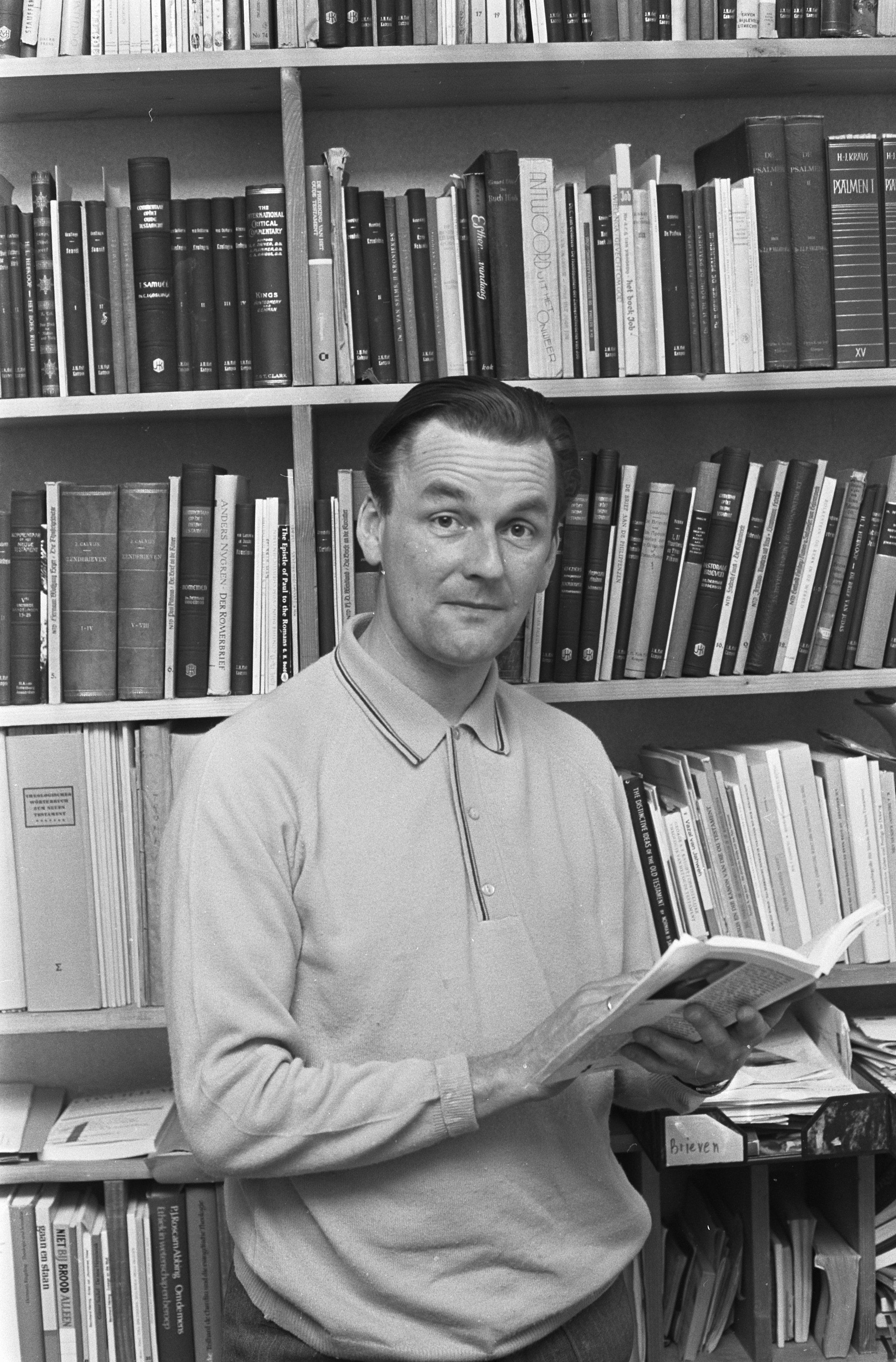 Collectie / Archief : Fotocollectie Anefo Reportage / Serie : [ onbekend ] Beschrijving : Opdracht Haagse Post : Dr. H.M. Kuitert Datum : 21 februari 1969 Persoonsnaam : Haagse Post Fotograaf : Nijs, Jac. de / Anefo Auteursrechthebbende : Nationaal Archief Materiaalsoort : Negatief (zwart/wit) Nummer archiefinventaris : bekijk toegang 2.24.01.05 Bestanddeelnummer : 922-1299